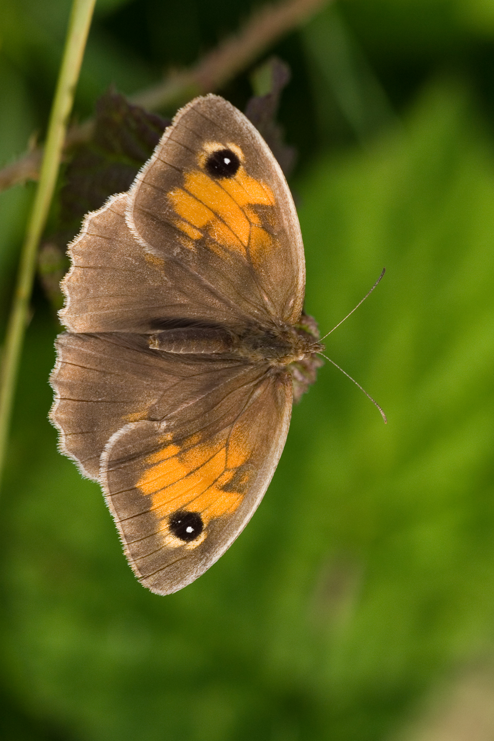 Maniola jurtina